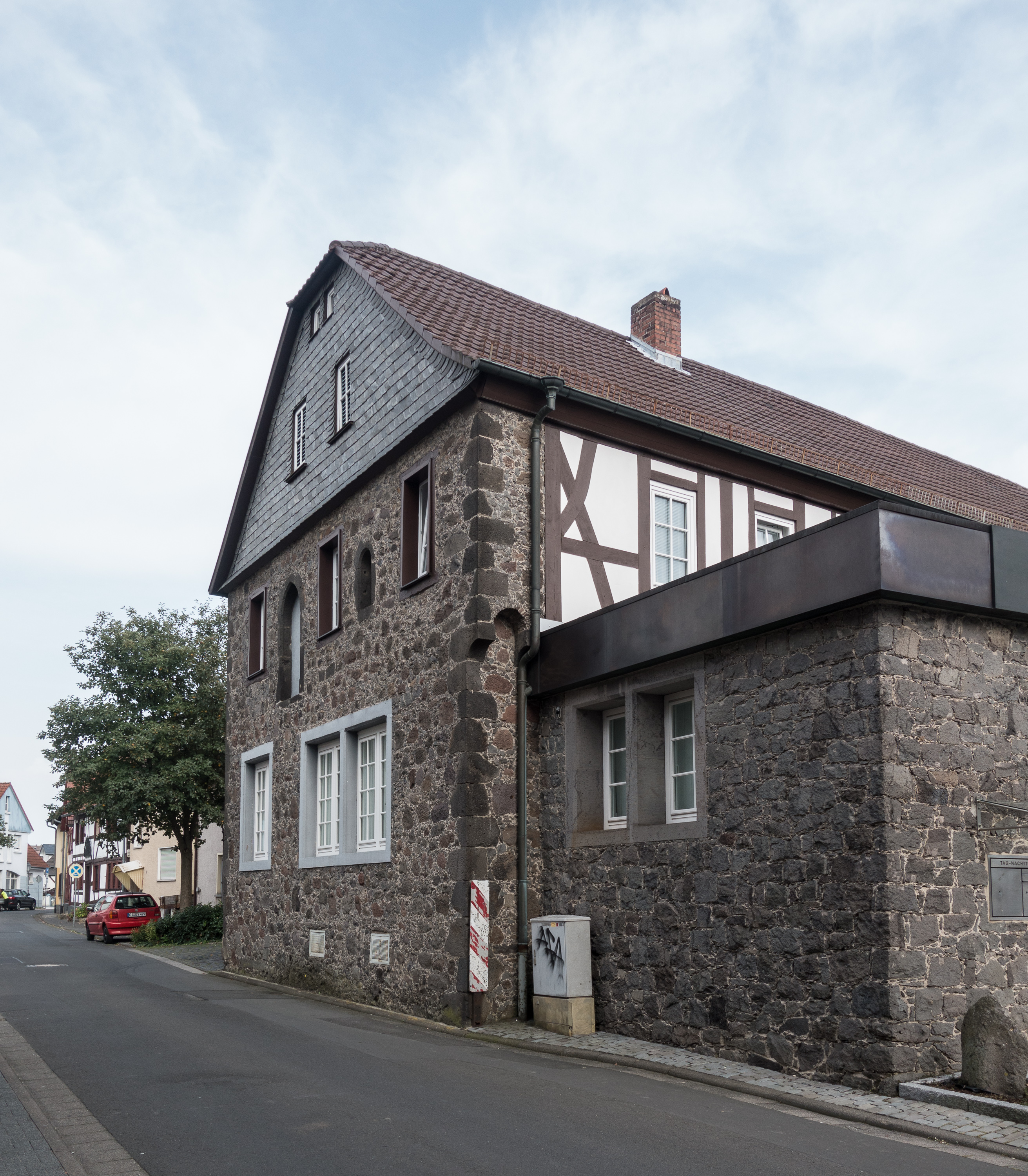 Ehem. Marstall oder Hospital um 1500. Das Antoniterkloster in Grünberg wurde um 1200 gegründet und bestand bis zur Einführung der Reformation in der Landgrafschaft Hessen im Jahre 1526. Ab 1577 wurde die Anlage zu einem landgräflichen Schloss (Wittwensitz) umgebaut.